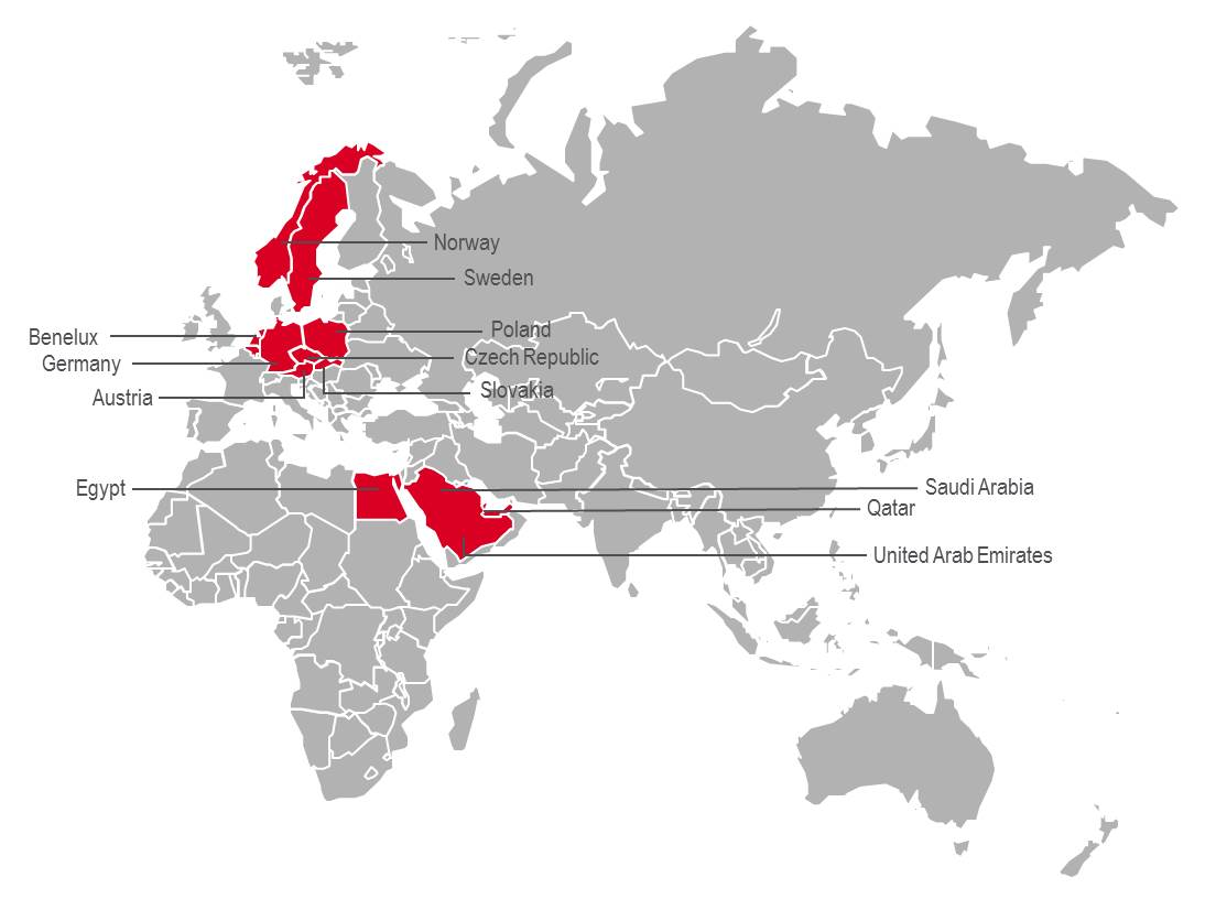 Weltweite Standorte XERVON Gruppe